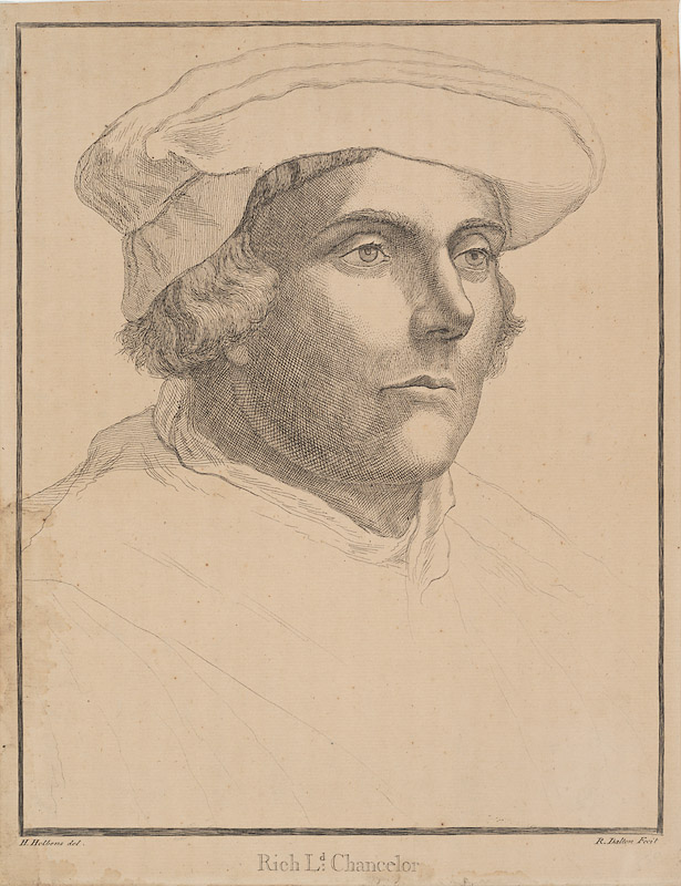 Richard Rich, 1st Baron Rich (1496/7-1567)